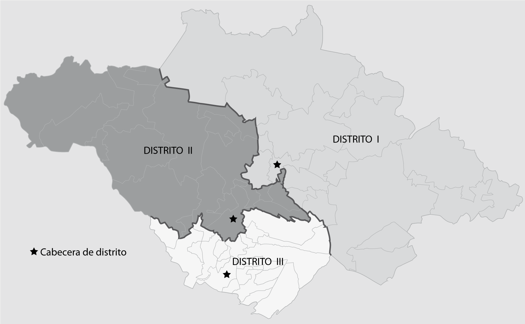 Mapa de Tlaxcala de los 3 Distritos Electorales Federales